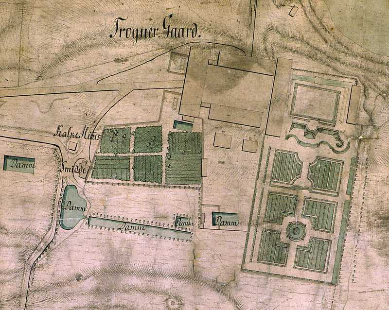 Kart over hagen til Frogner Hovedgård